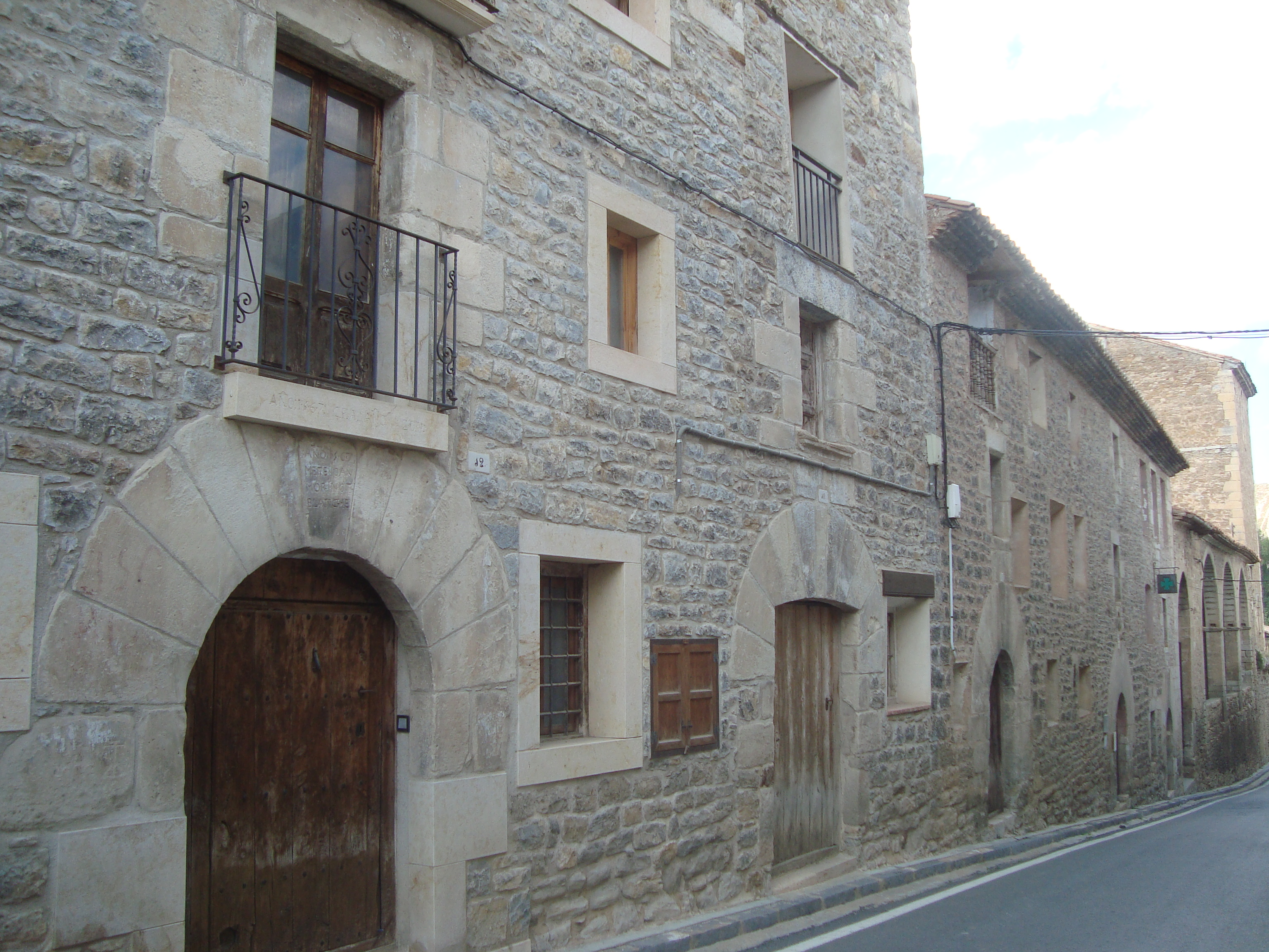 Villarroya de los Pinares (Teruel). Vista urbana.